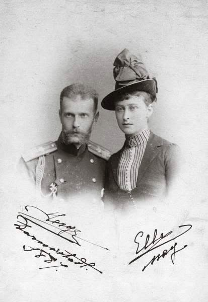 Szergej Alexandrovics Romanov és a felesége, Jelizaveta Fjodorovna